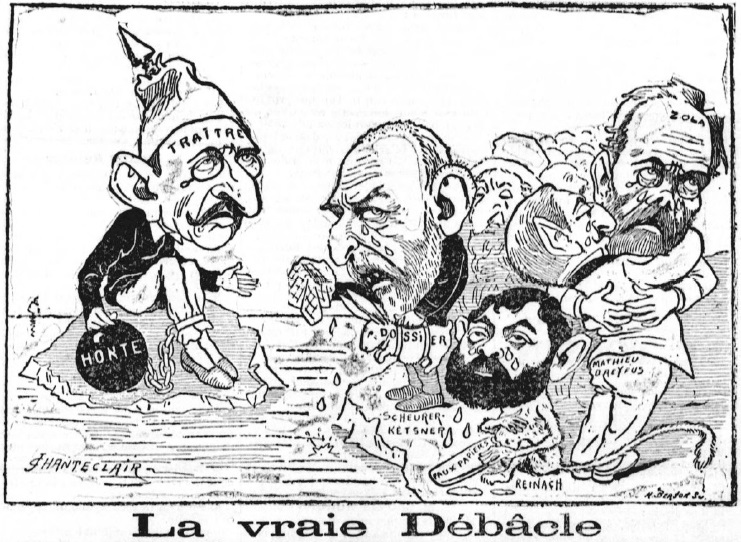 "La vraie débâcle".